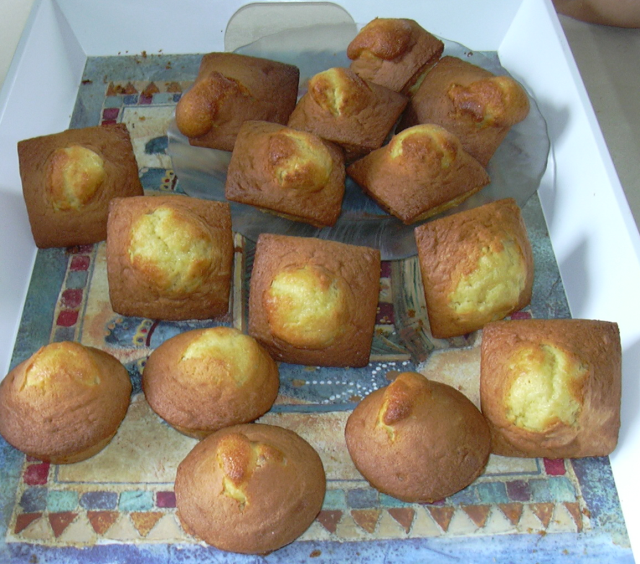 Madeleines